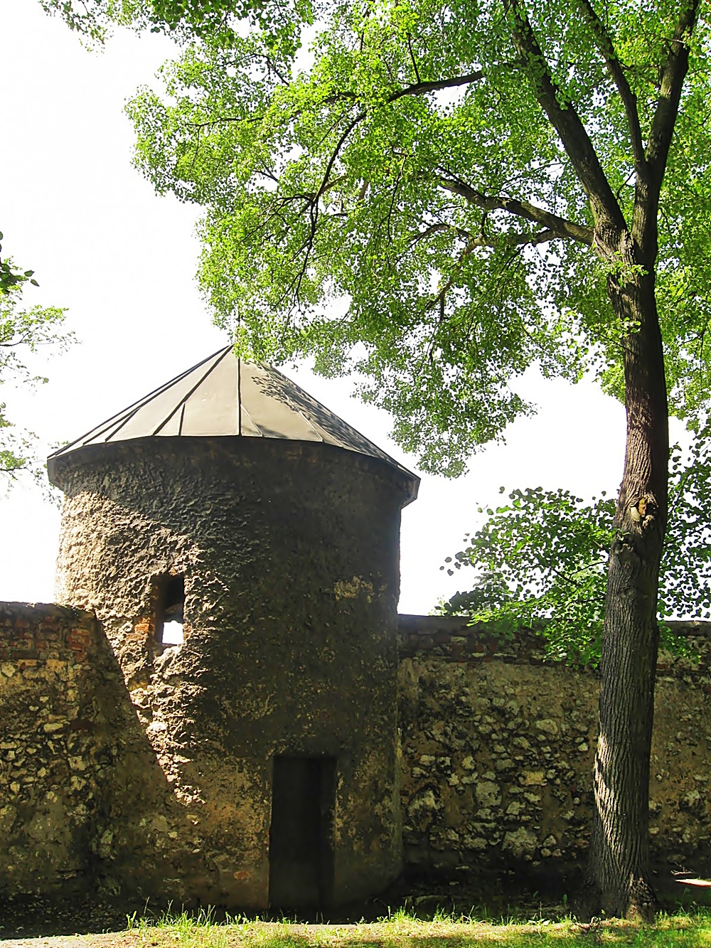 Wancerzów - fragmenty obwarowań z basztami